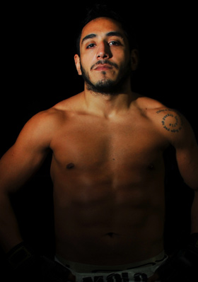 Molo González